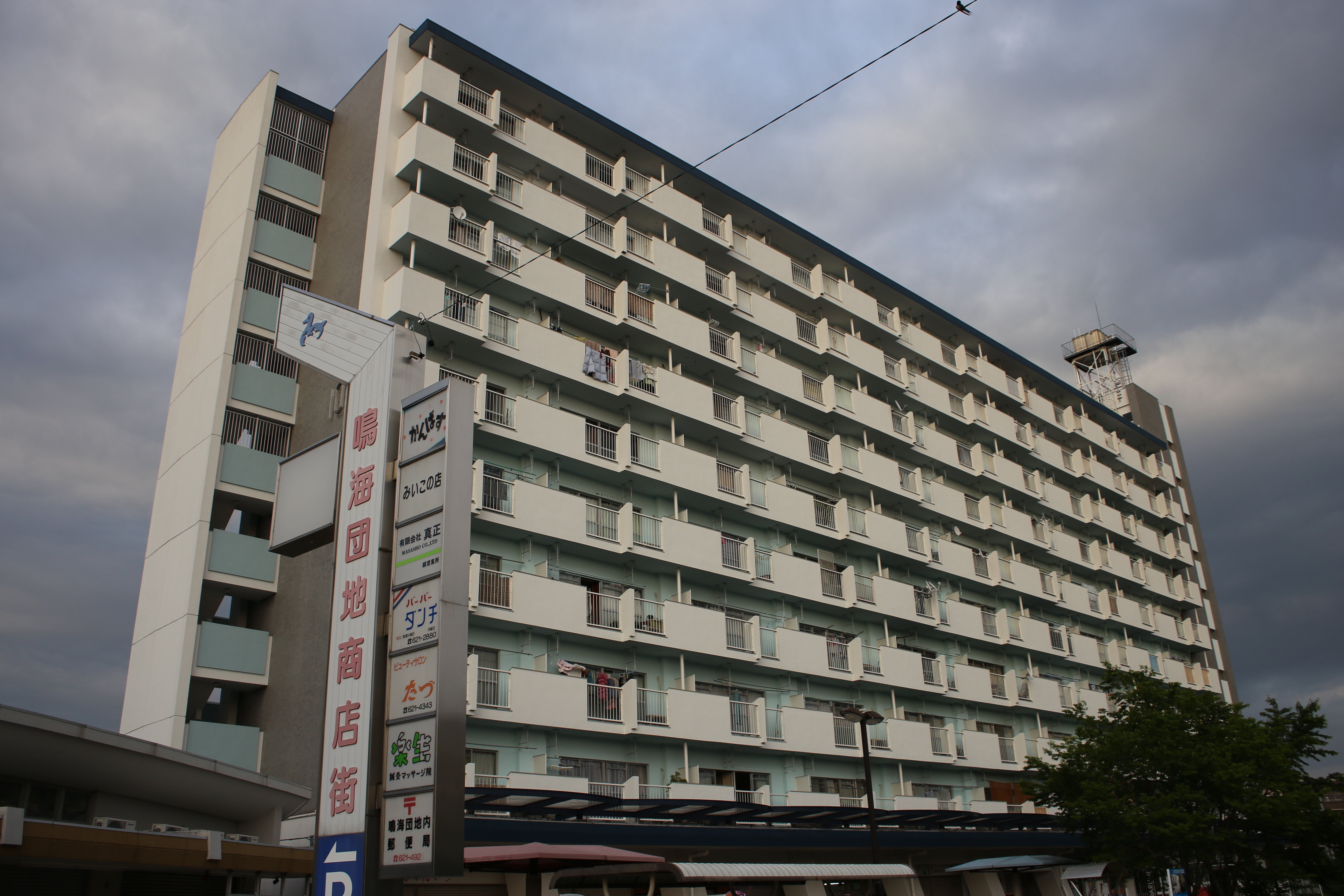 愛知県名古屋市緑区鳴海町の鳴海団地